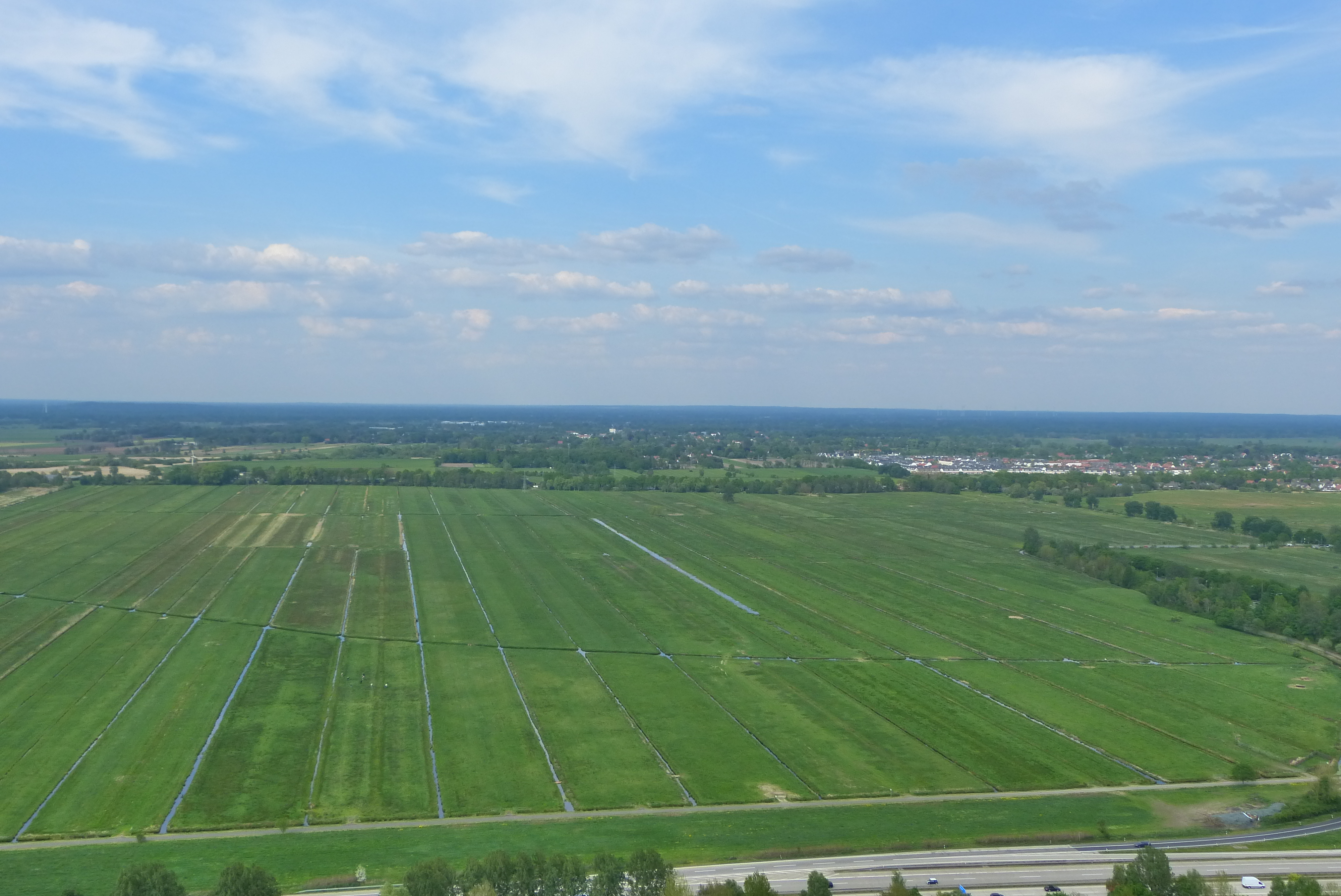 Standort: Fallturm des ZARM in Bremen, Fallturmspitze/Besucherebene (130 Meter): Blick nach Nordost - Westliches Hollerland (Leherfeld).